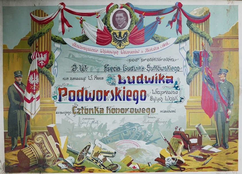 Dyplom honorowego członka Stowarzyszenia Wojskowych Weteranów im. księcia Aleksandra Ludwika Sułkowskiego, po 1929 Ze zbiorów Muzeum Historycznego w Bielsku-Białej